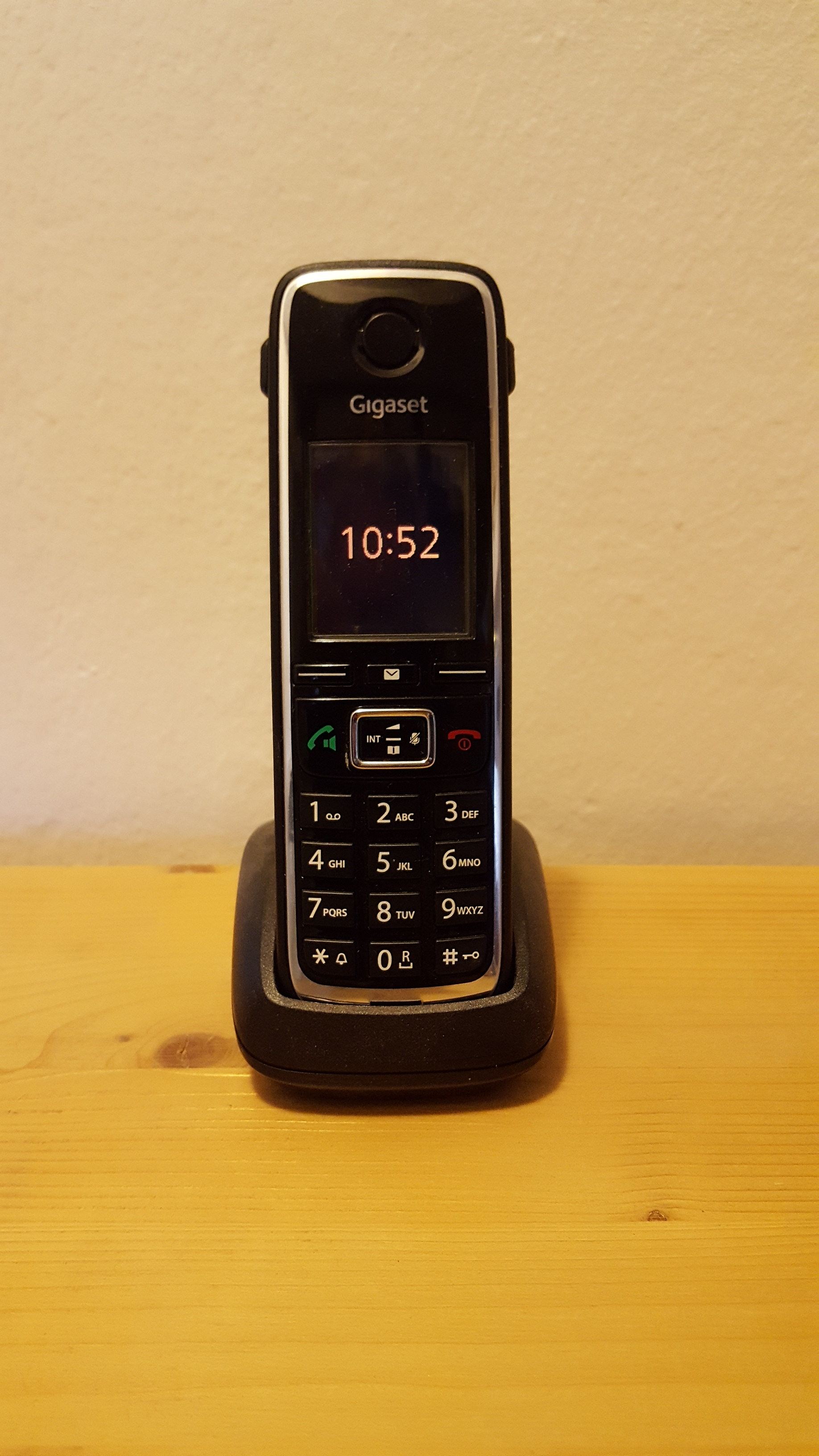 VoIP telephone